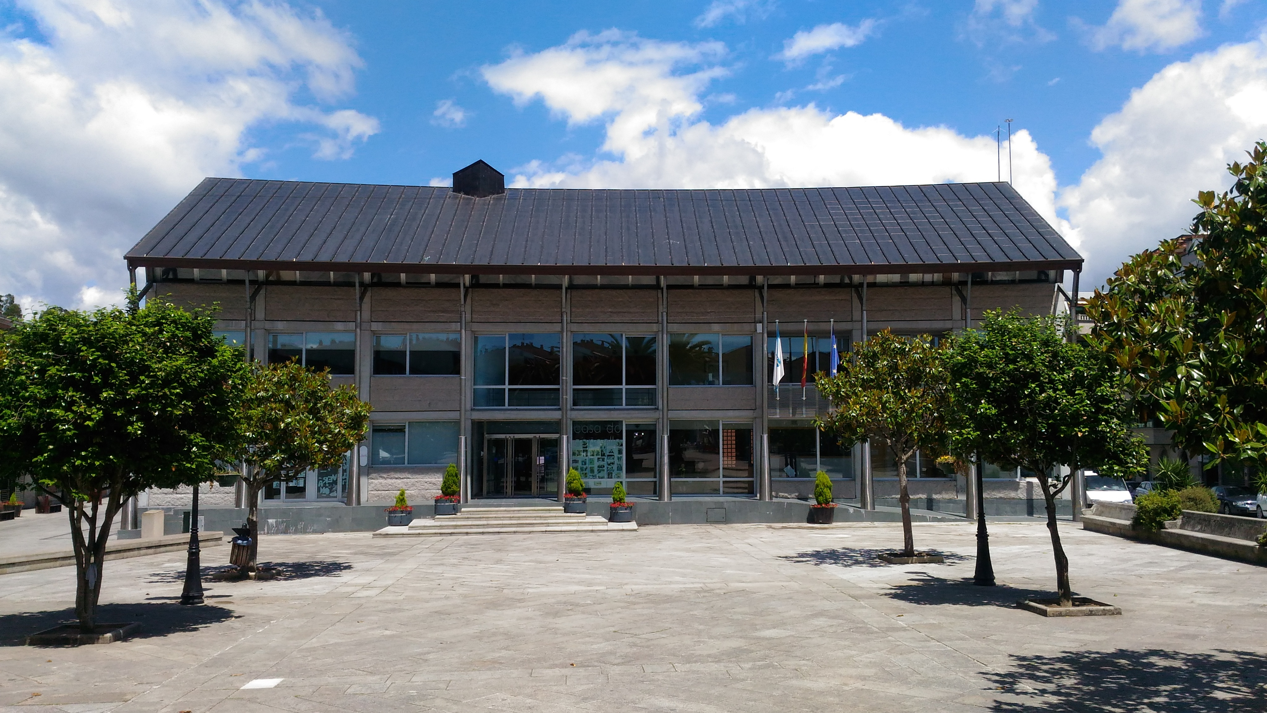 Casa do concello de Salceda de Caselas